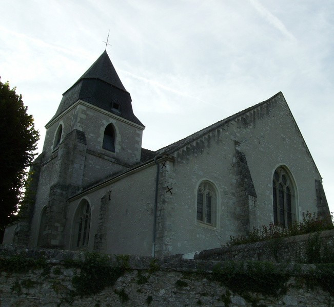 Église Saint-Secondin de Molineuf (Loir-et-Cher, France) .